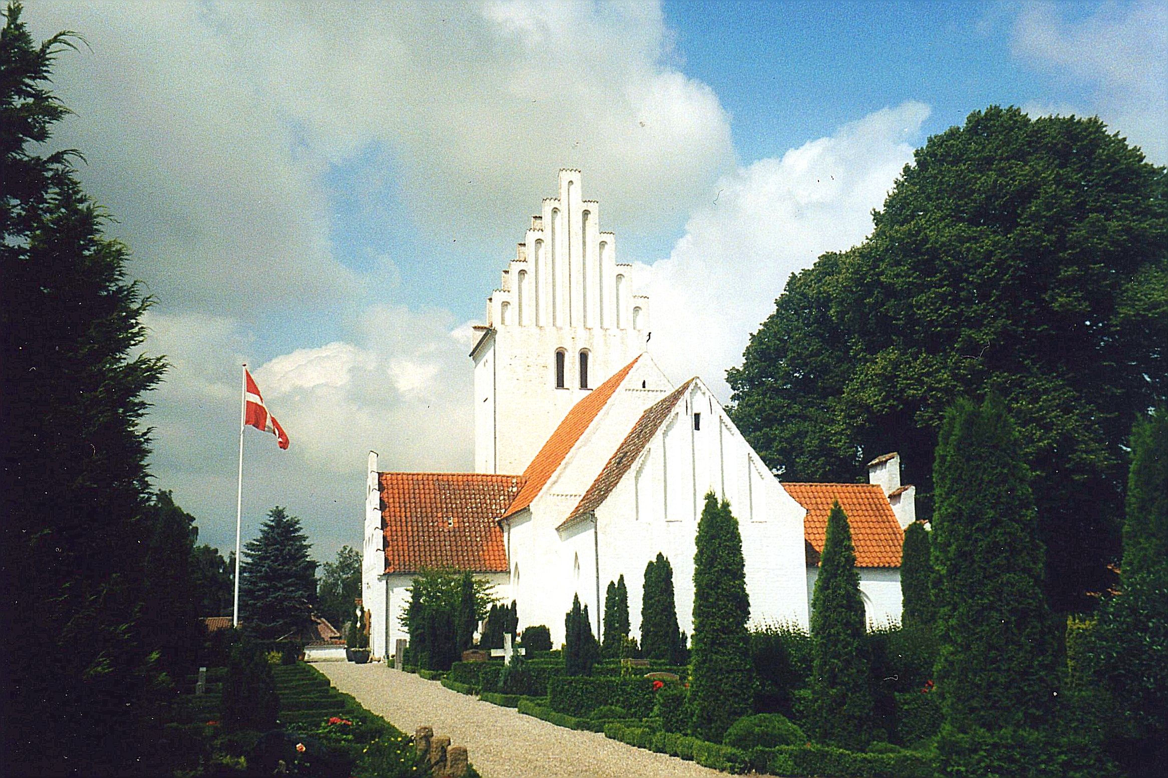 Teestrup Kirke, Teestrup Sogn, Faxe Kommune